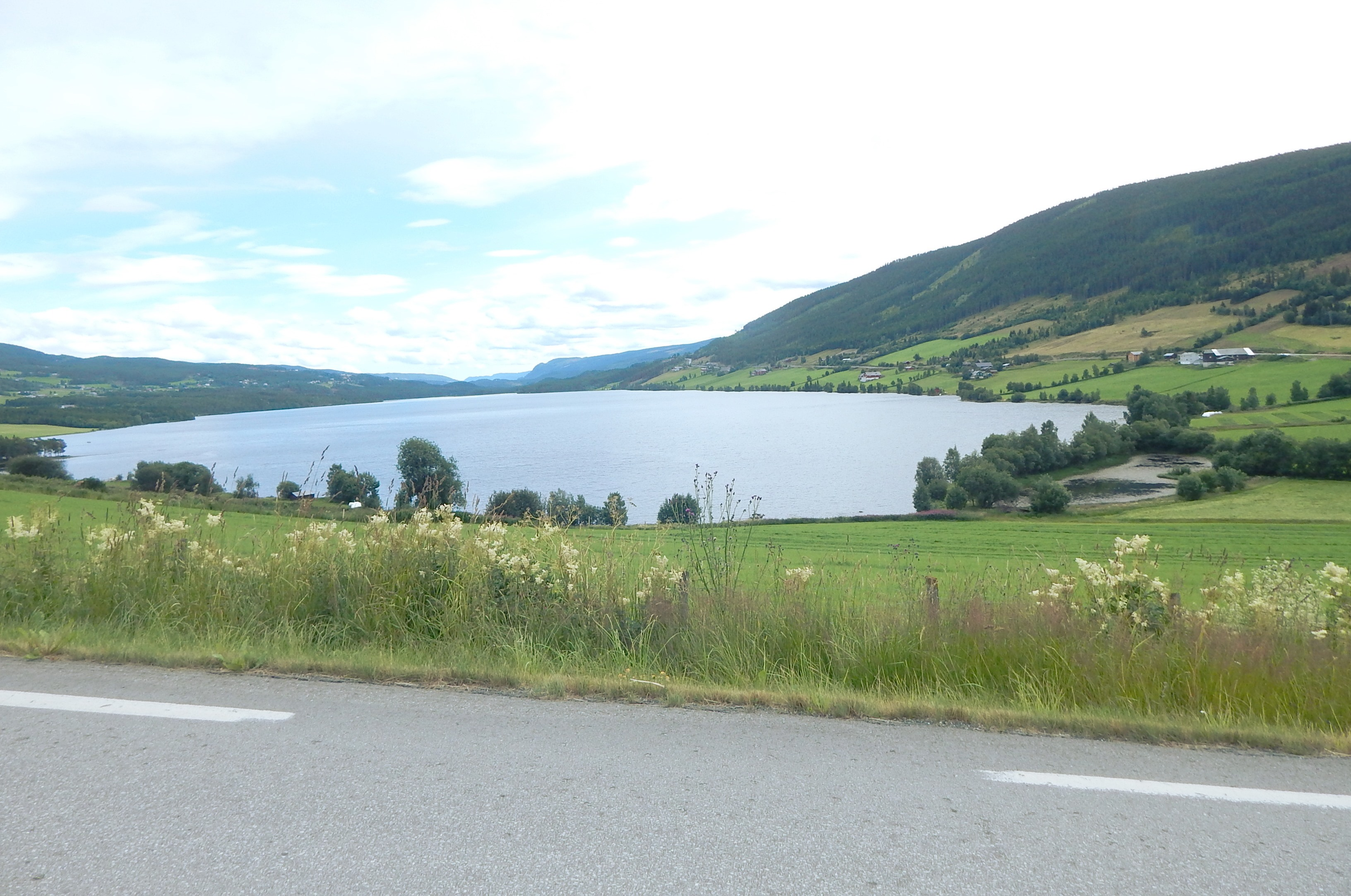 Fylkesvei 2490 (tidl. 269) snor seg rundt Volbufjorden.